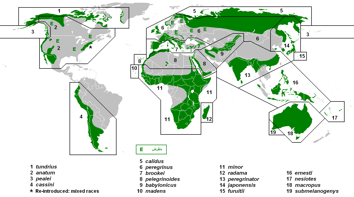 Subspecies map of Falco peregrinus (breeding distributions only) - Arabic version مناطق انتشار سلالات الشاهين (توزيع مناطق التكاثر فقط) - النسخة العربية